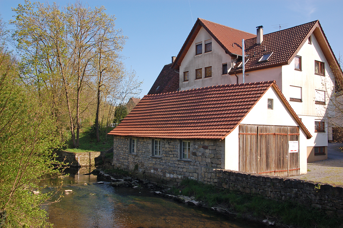 Bachmühle, Glemsstraße 5 in Unterriexingen: Mündung des Mühlkanals